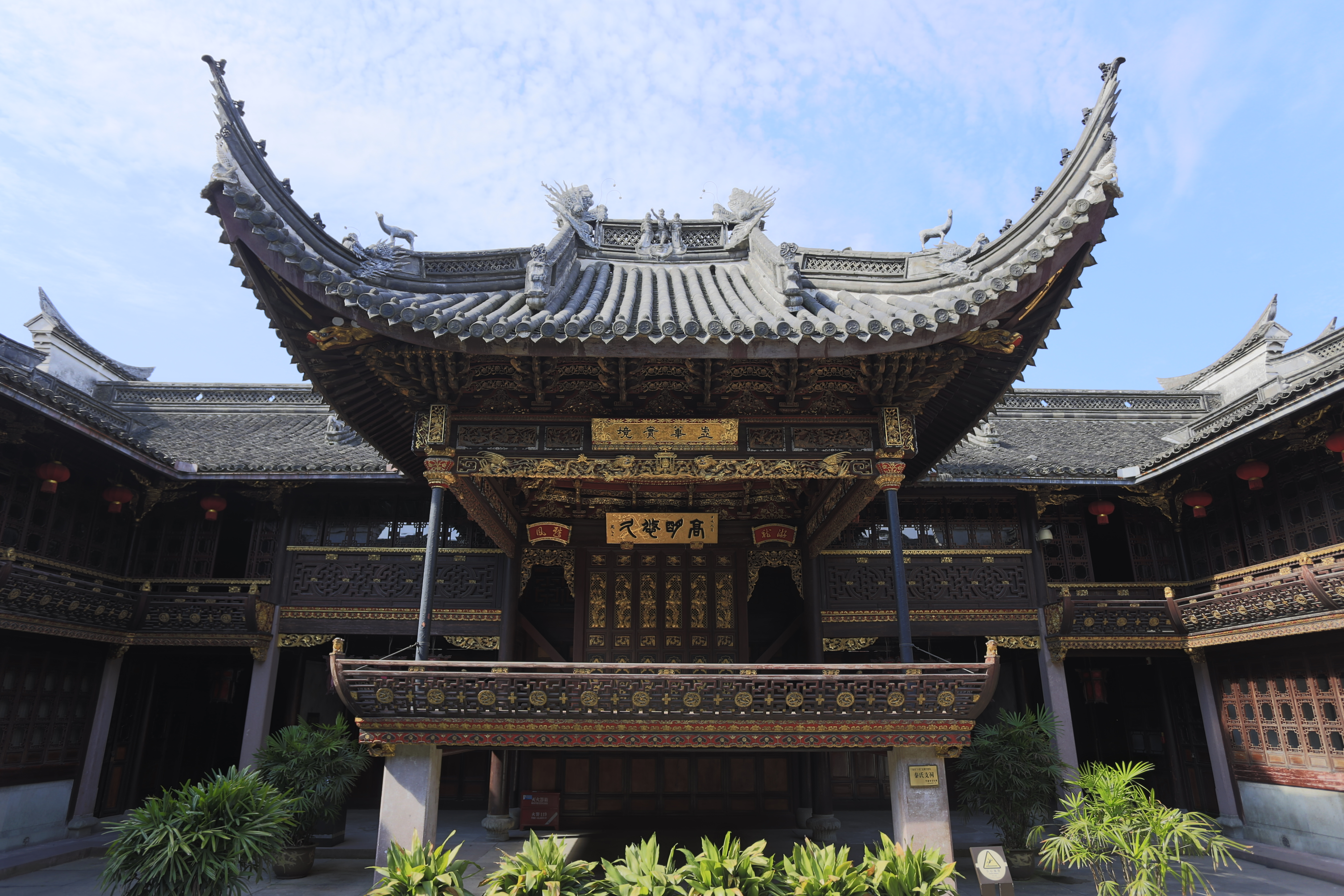 宁波天一阁 —— 秦氏支祠戏台